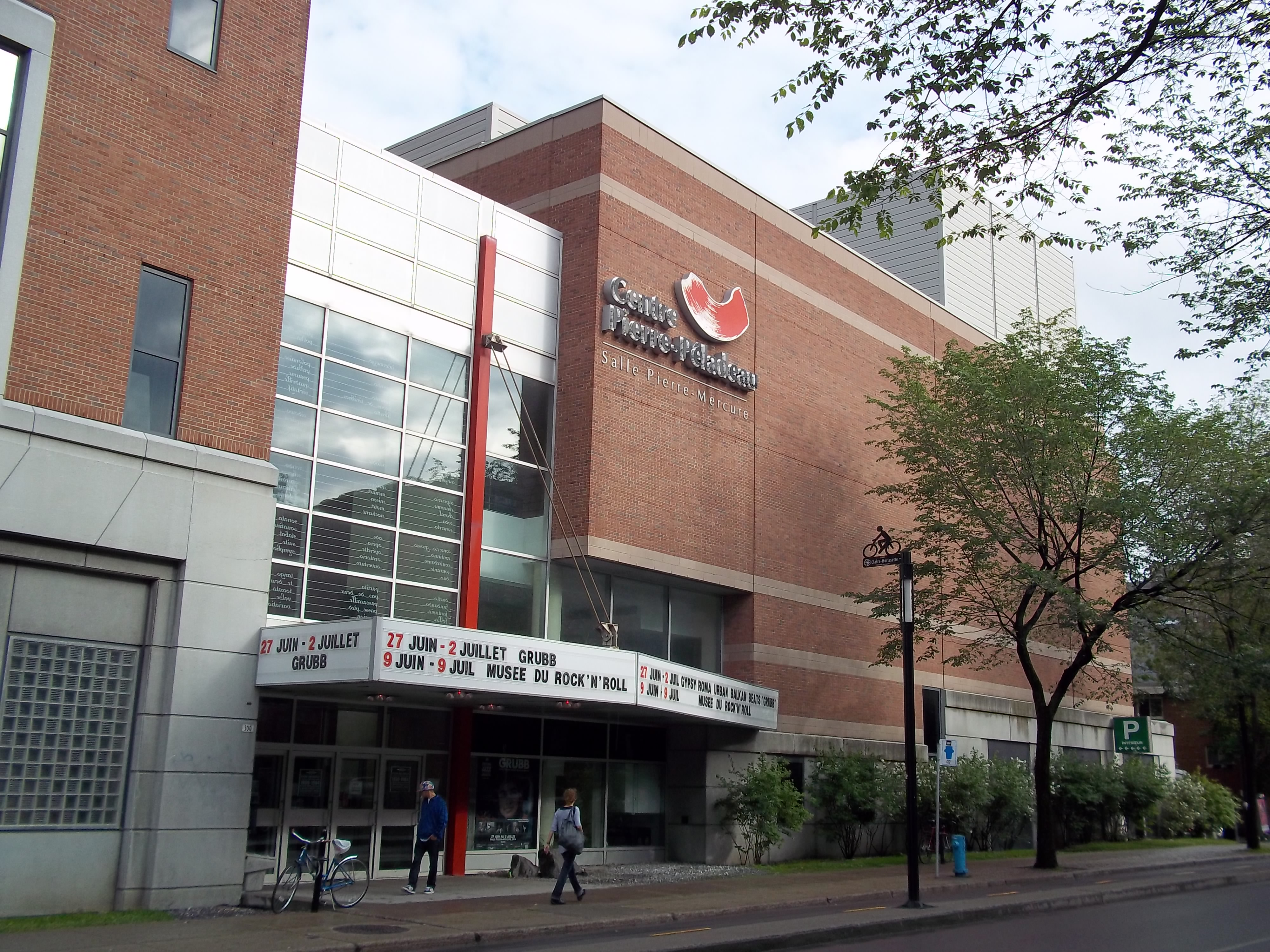 Façade du Centre Pierre-Péladeau, 300, boulevard De Maisonneuve Est, Montréal (Québec)